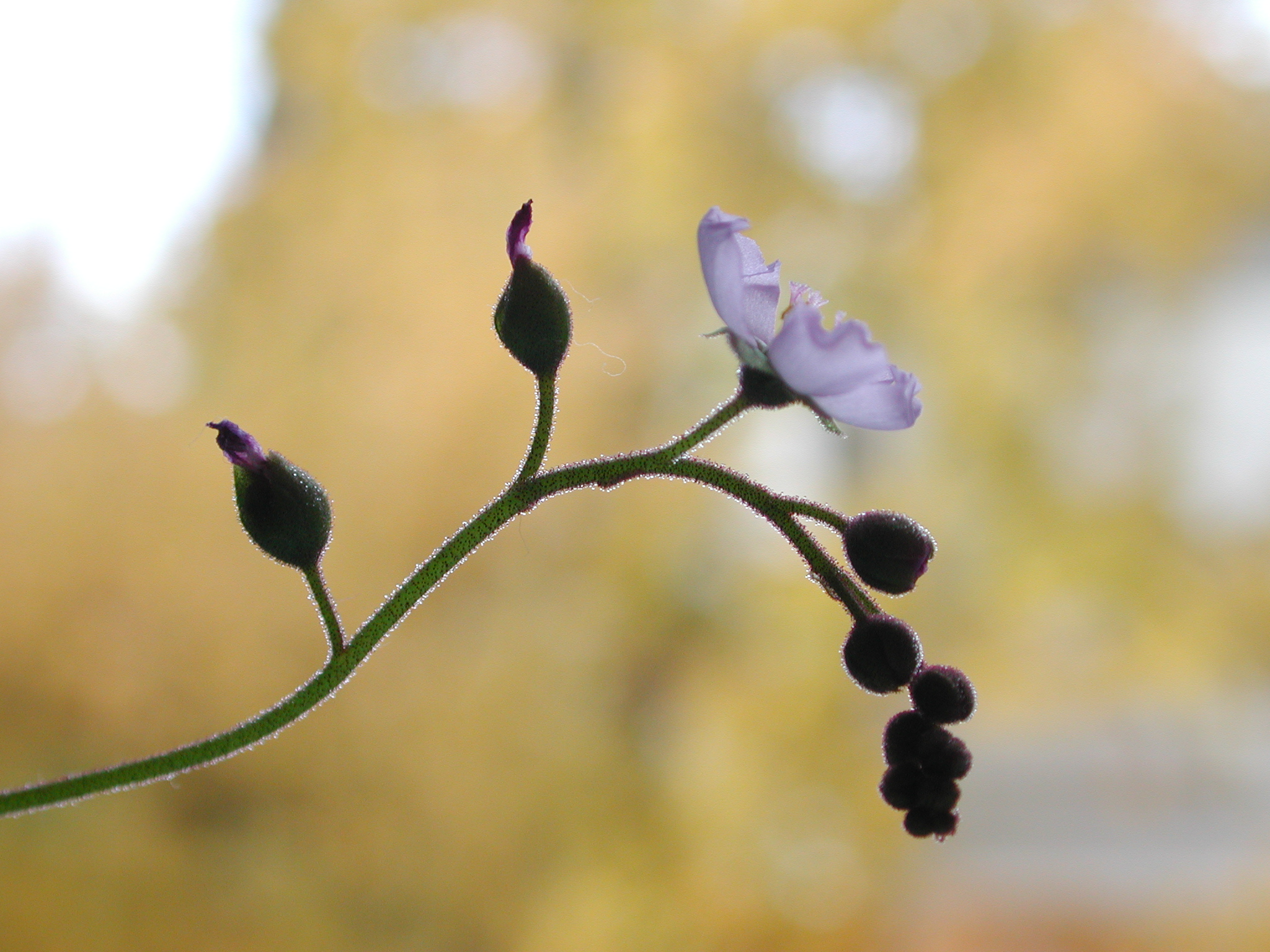 Drosera aliciae in culture